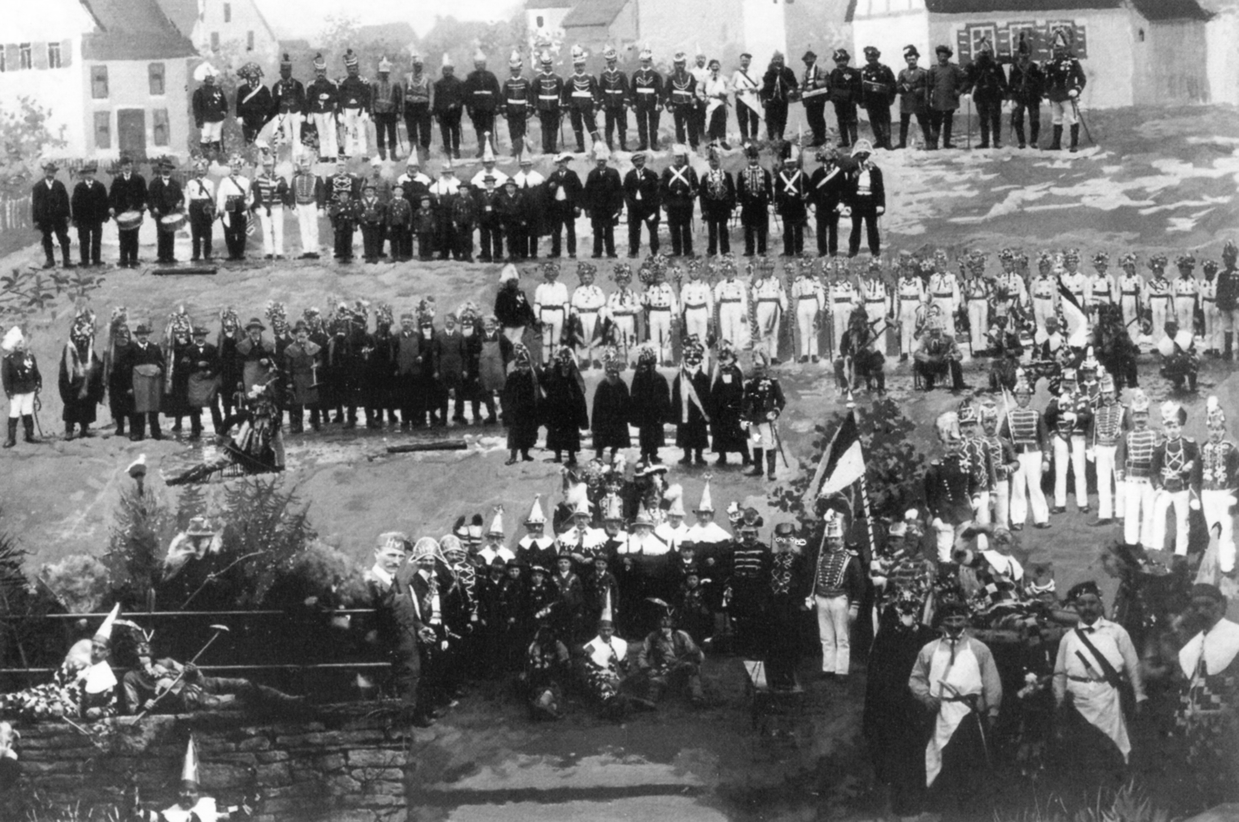 Grosselfingen, Ehrsames Narrengericht, 1914 (Fotomontage mit allen 42 Chargen)